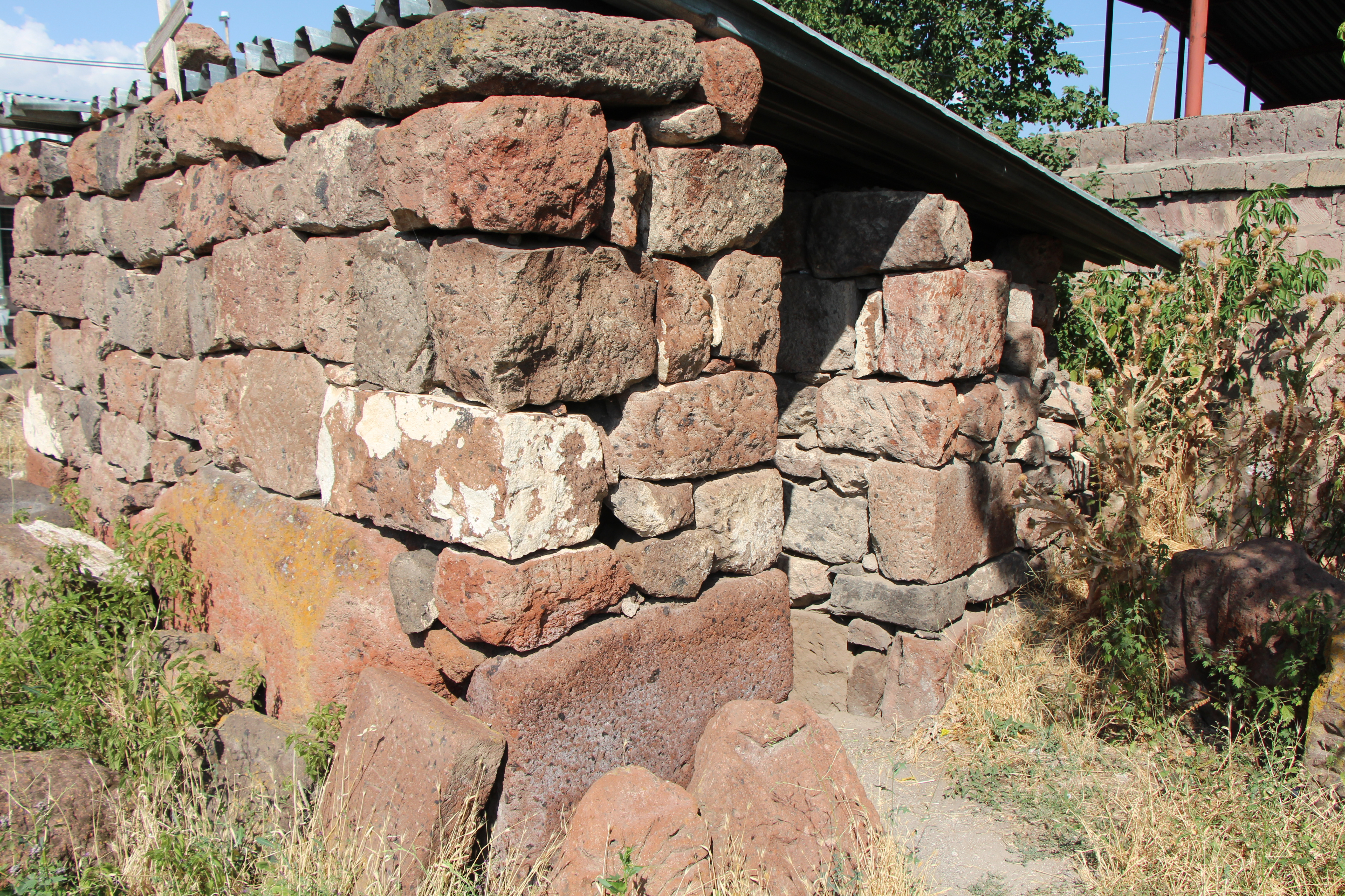 Կաթնաղբյուր, Արագածոտնի մարզ, ՄԱՏՈՒՌ 19 դ. գ. մ. 2.57/9 57/9